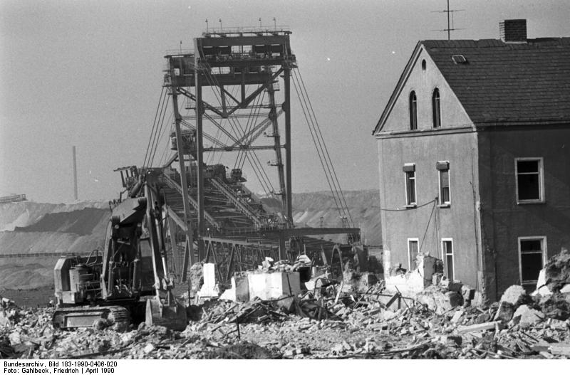 Bez. Leipzig, Dorf geräumt für Tagebau ADN-Gahlbeck/ 6.4.90 Bez. Leipzig: Tagebaue, Der Abriß ganzer Dörfer - hier in der Gemeinde Wolteritz im Vorfeld des Tagebaues Breitenfeld - geht weiter. Wie die Landschaften über der Braunkohle gerettet werden können, darüber beraten Vertreter der Grünen vom 6.-8. April im Leipziger Opernhaus.